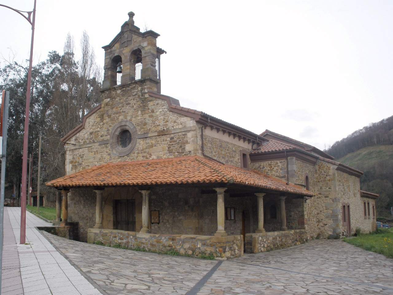 Iglesia de San Martín, Riaño de Langreo (Asturias)